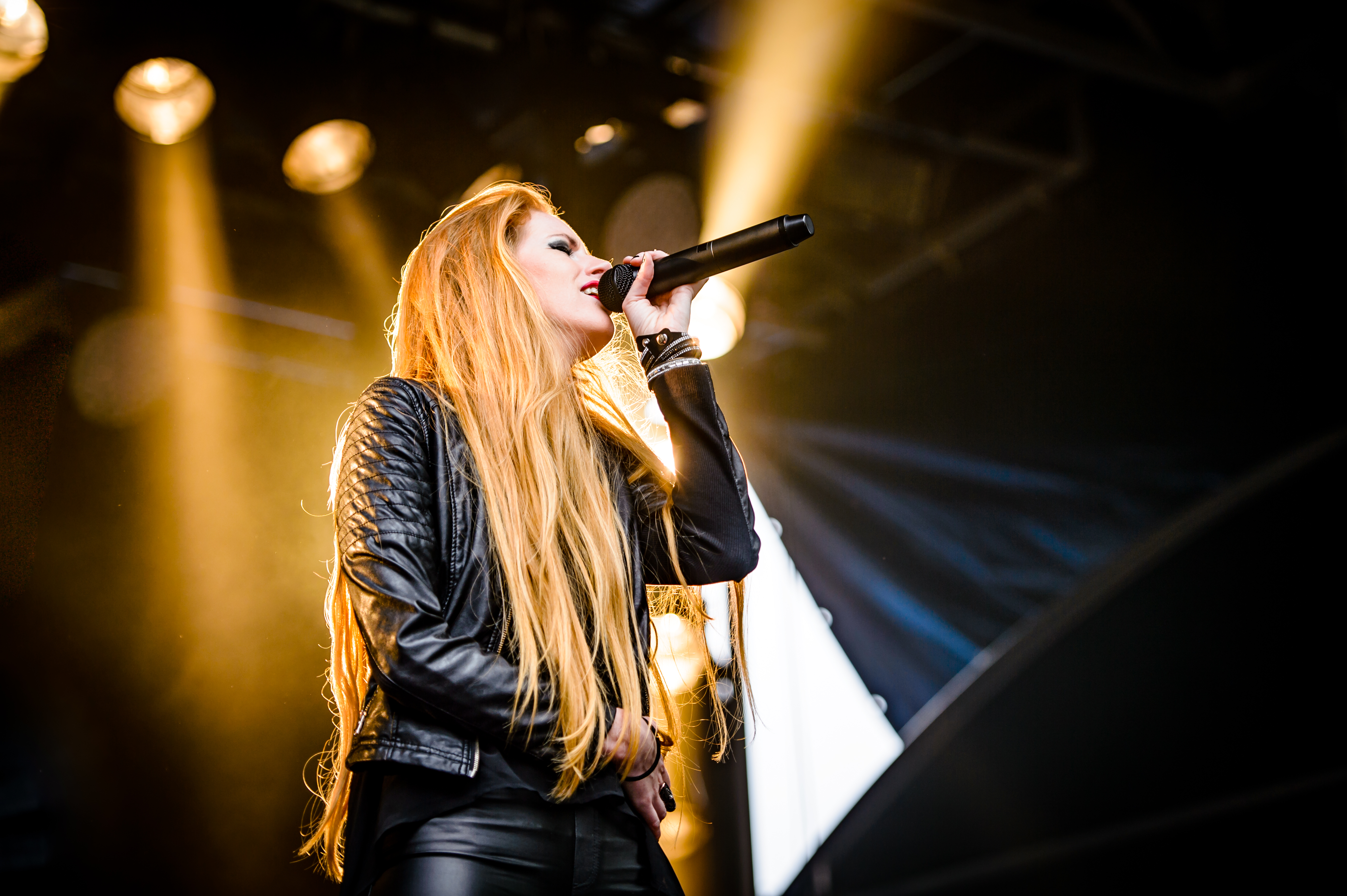 'Castle Rock 2017; Mülheim an der Ruhr': 'Aeverium'